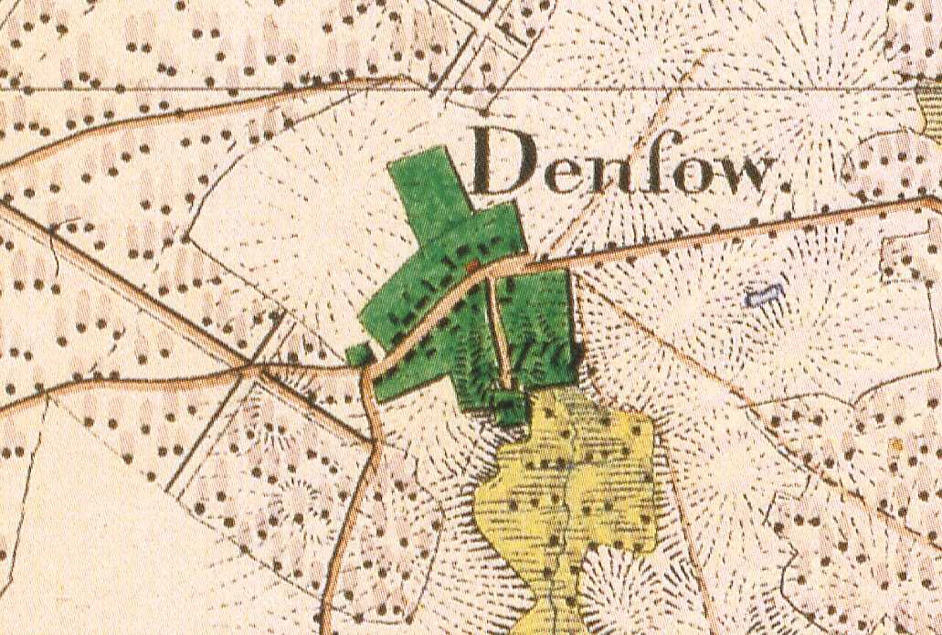 Densow, Ortsteil der Stadt Templin, Landkreis Uckermark, Brandenburg, Ausschnitt aus dem Urmesstischblatt 2846 Gandenitz von 1825